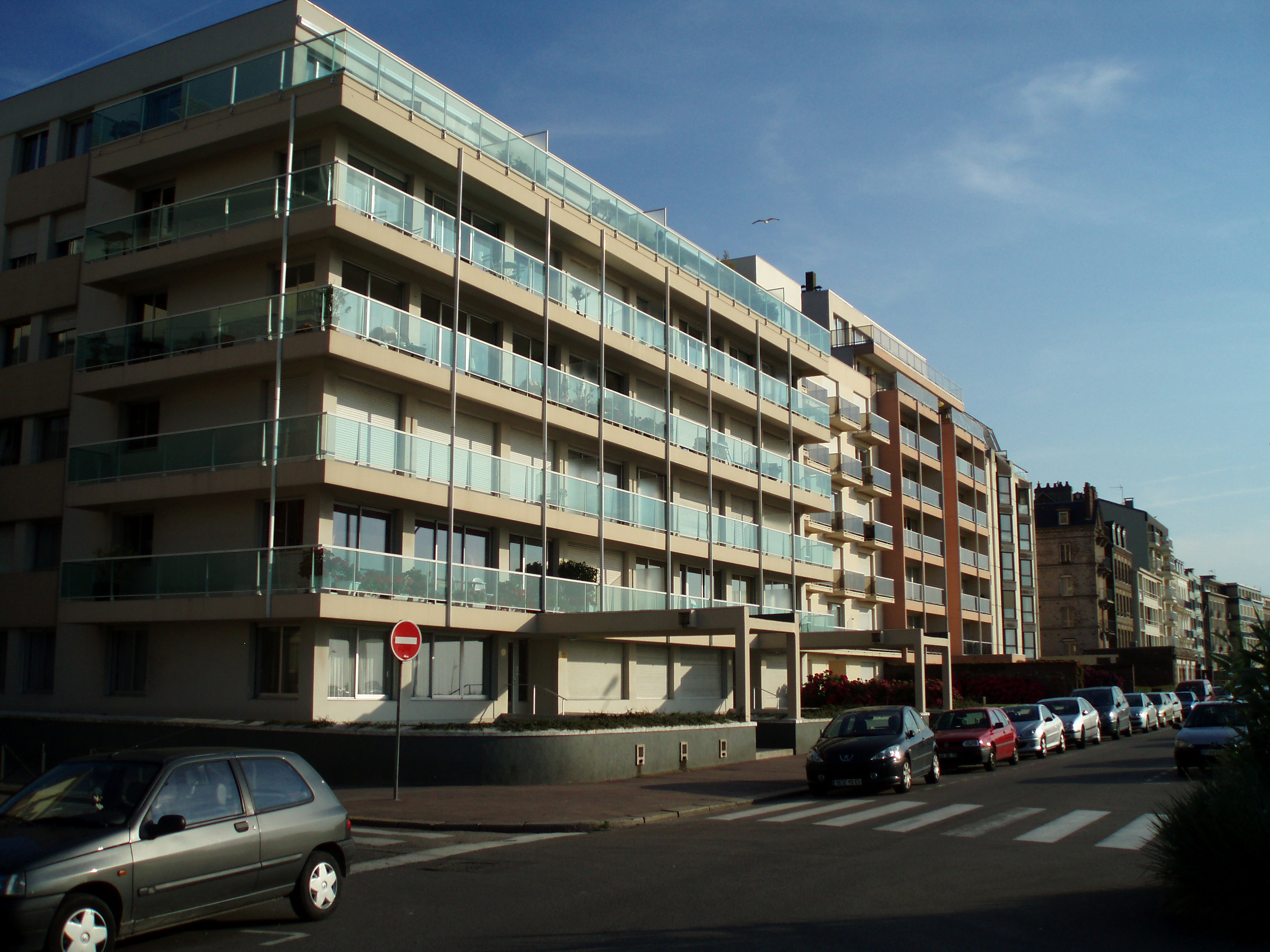 Résidences immobilières des années 70 sur le boulevard de Verdun à Dieppe